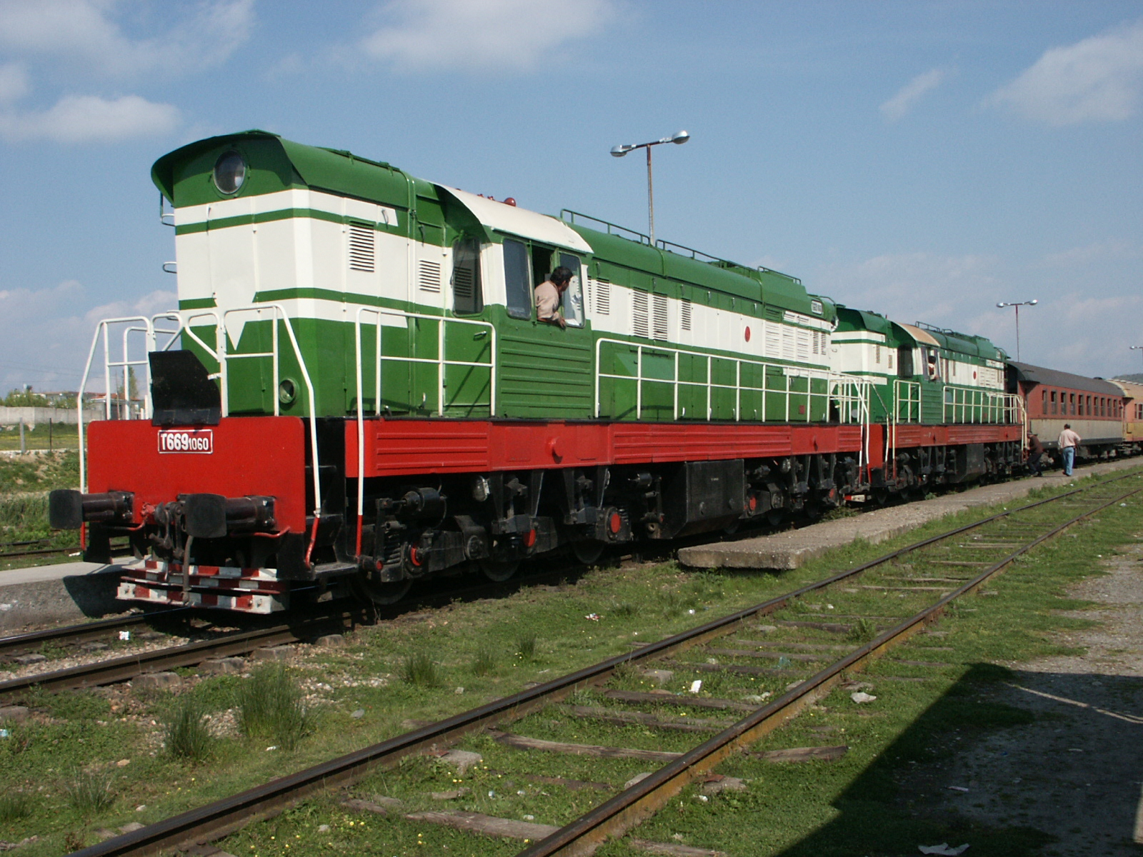 Durrës, Albania, Spring 2007